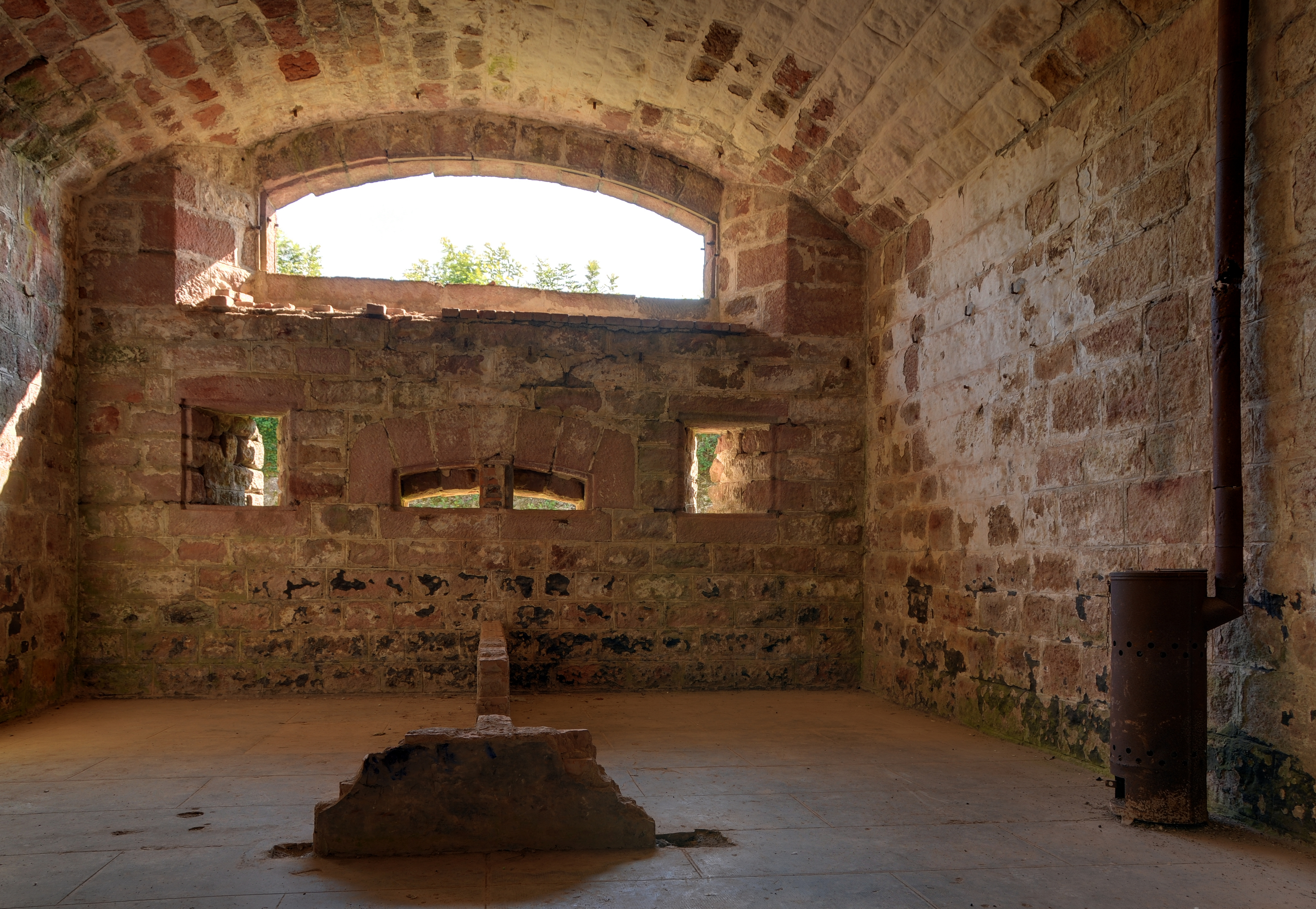 Chambre des officiers et sous-officiers (HDR).